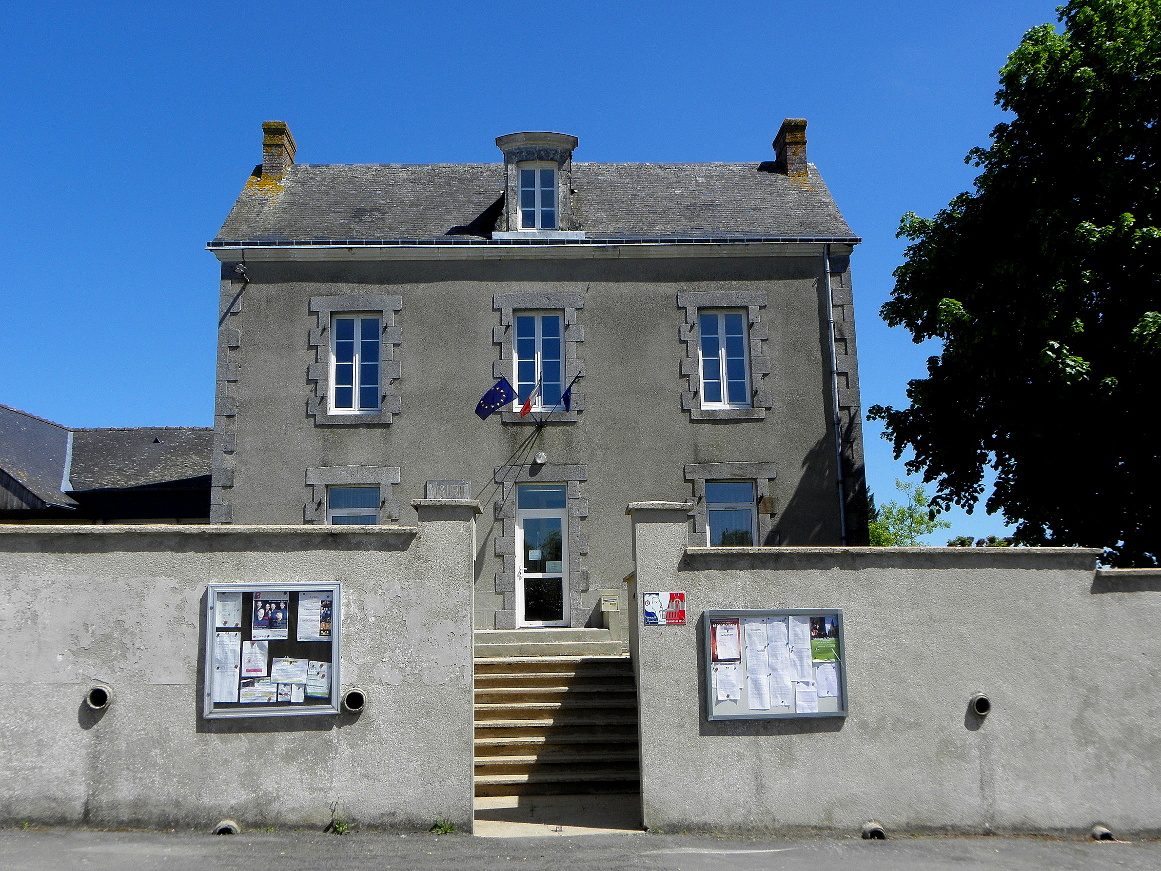 Saint-Germain-d'Anxure (53). La Mairie.